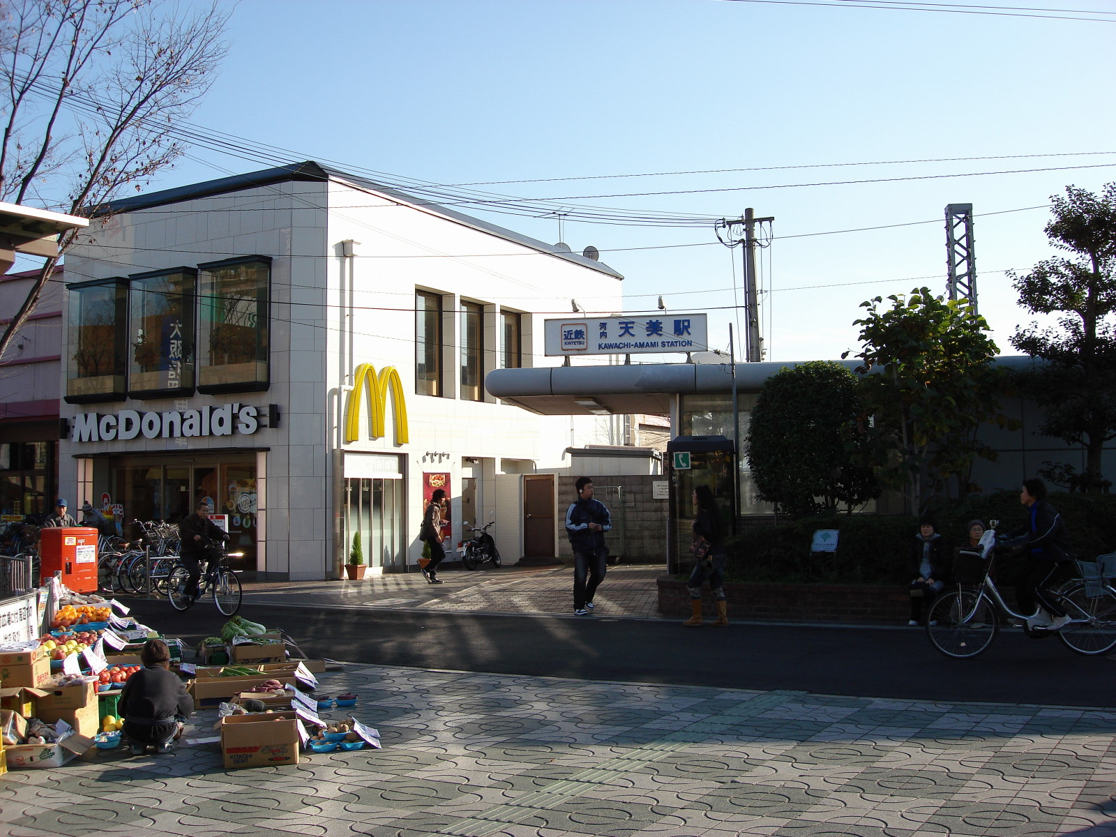 Kintetsu line station 河内天美駅